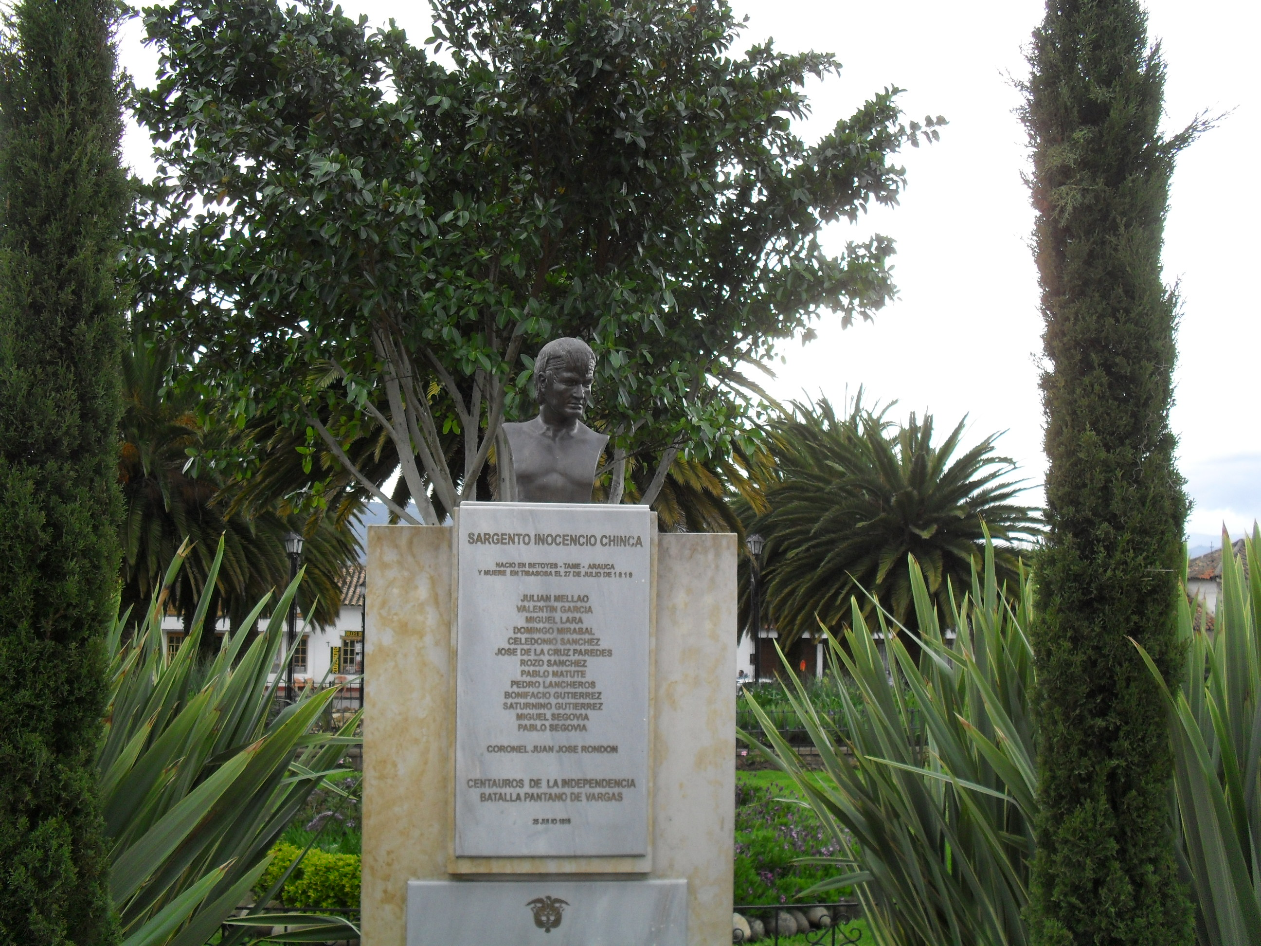 Monumento dedicado a Inocencio Chincá, uno de los lanceros que participó en la batalla del Pantano de Vargas. Es exhibido en el parque principal del municipio de Tibasosa, departamento de Boyacá, Colombia